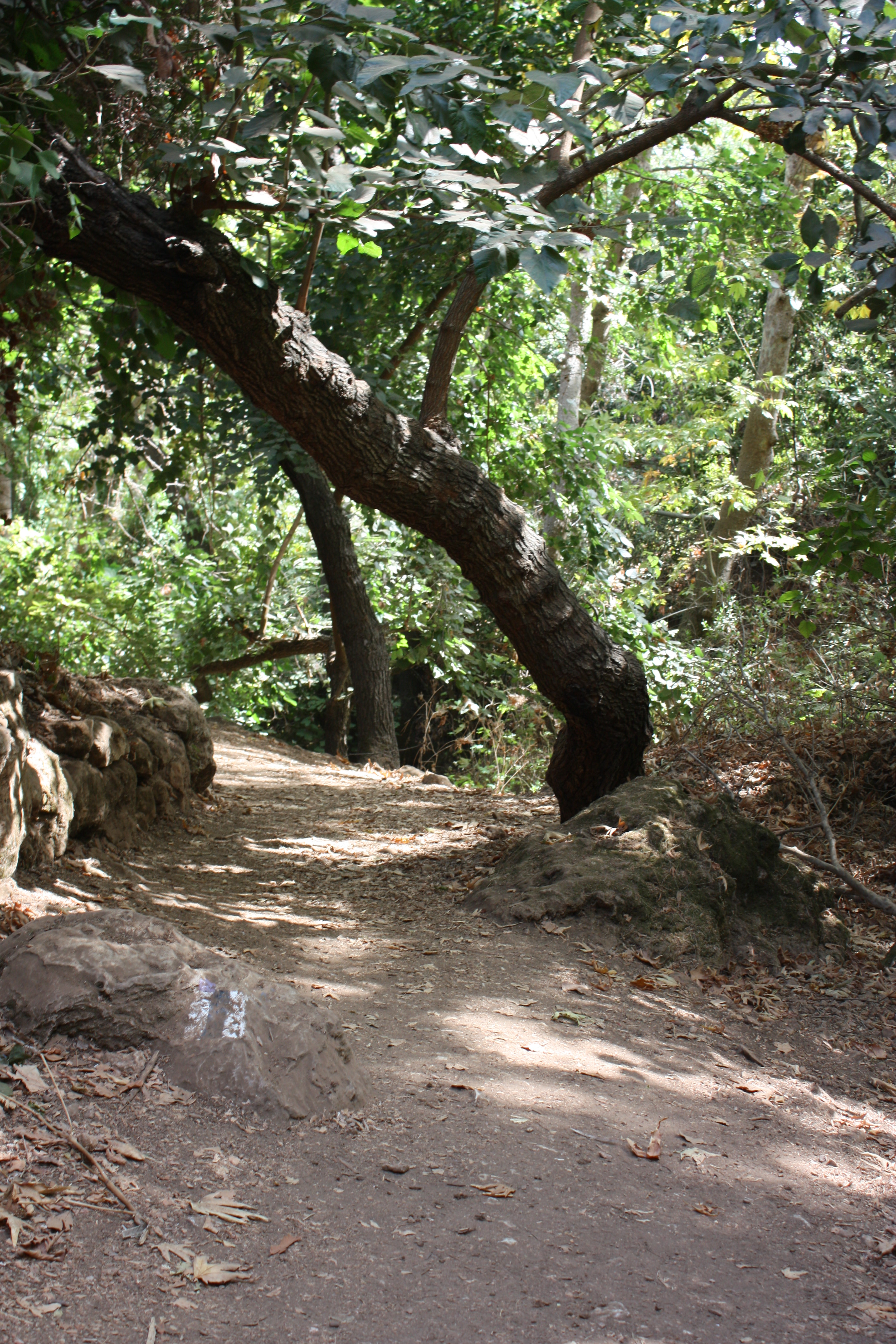 נַחַל עַמּוּד הוא נחל באזור הגליל העליון הנשפך אל הכנרת.